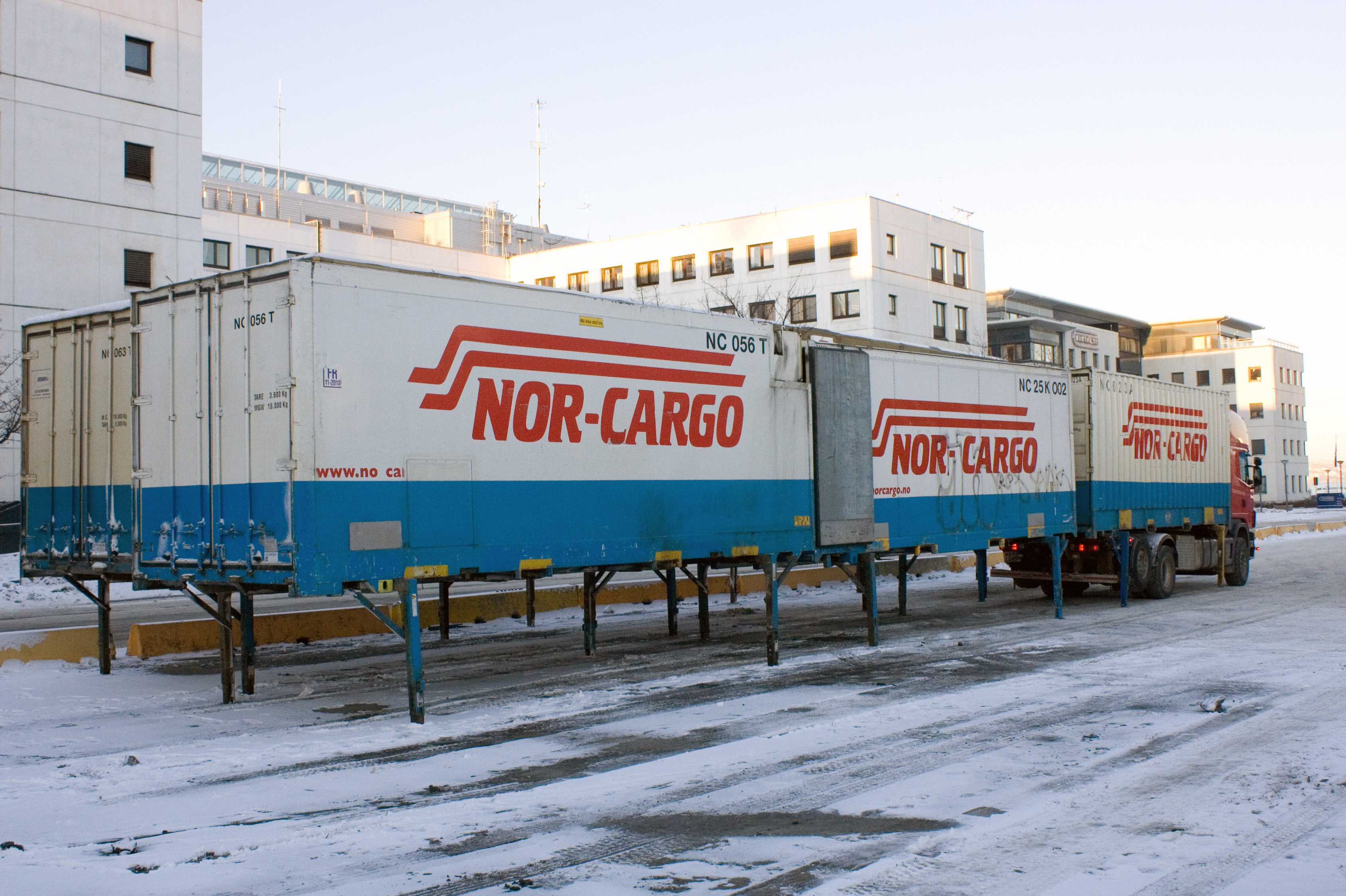 Nor-Cargo-containere